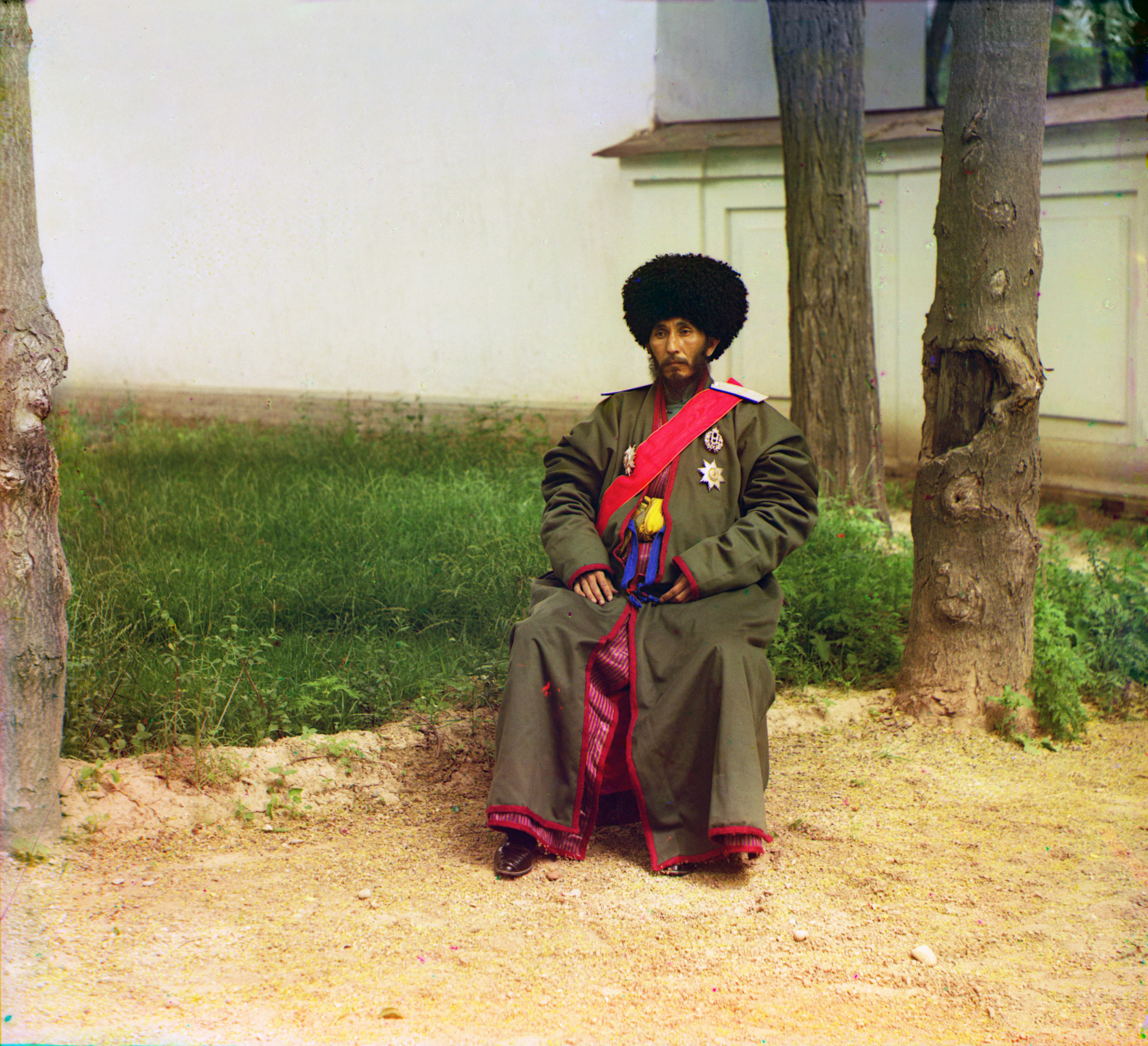 Его Высочество Хан Хивинский